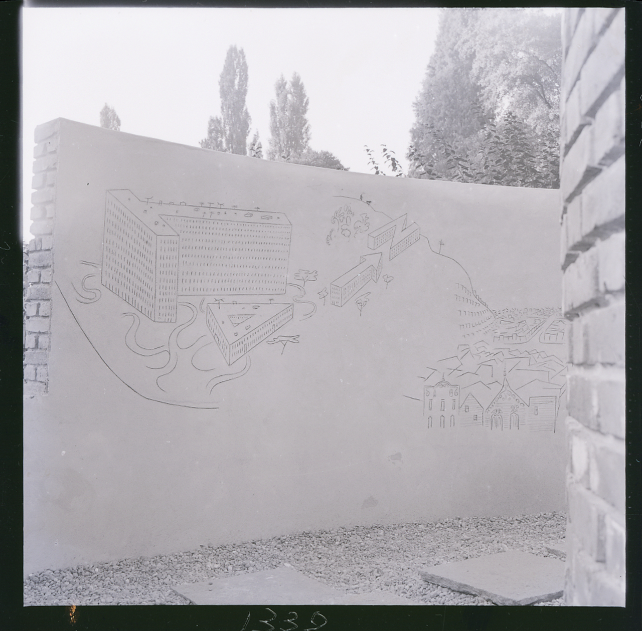 Milano. X Triennale, 1954. BBPR, Padiglione Il labirinto dei ragazzi (ora demolito). Saul Steinberg, Graffiti, 1954. Servizio fotografico : Milano, 1954 / Paolo Monti. - Buste: 22, Fototipi: 22 : Negativo b/n, gelatina bromuro d'argento/ pellicola ; 6x6. - ((Serie costituita da 22 buste di negativi identificati con i nn.: 21086, 21087, 21088, 21089, 21090, 21091, 21092, 21093, 21094, 21095, 21096, 21097, 21098, 21099, 21100, 21101, 21102, 21103, 21104, 21105, 21106, 21107, e tenute insieme da una graffetta. - Sulla busta identificata con il n. 21086 iscrizione didascalica manoscritta a penna: "Steinberg". - Sul coperchio della scatola contenente la serie iscrizione documentaria manoscritta a matita rossa: "X [per] TR[iennale] [19]54". - La X Triennale (Prefabbricazione - Industrial Design: Esposizione Internazionale delle Arti Decorative e Industriali Moderne e dell'Architettura Moderna) si tenne dal 28 agosto al 15 novembre del 1954. - Occasione: Documentazione della X Triennale di Milano, 1954